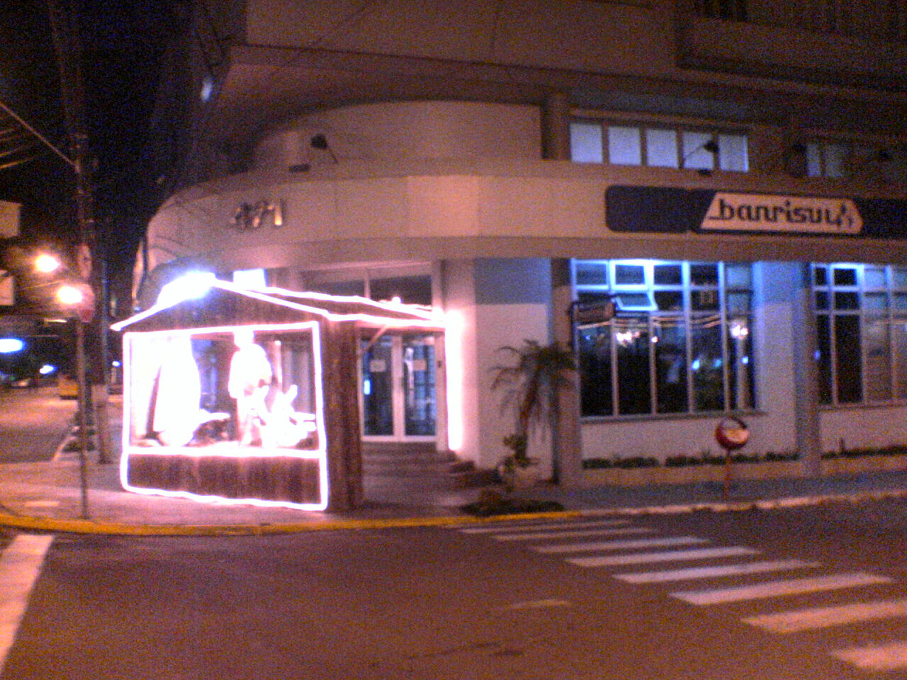 Agência Banrisul Farroupilha